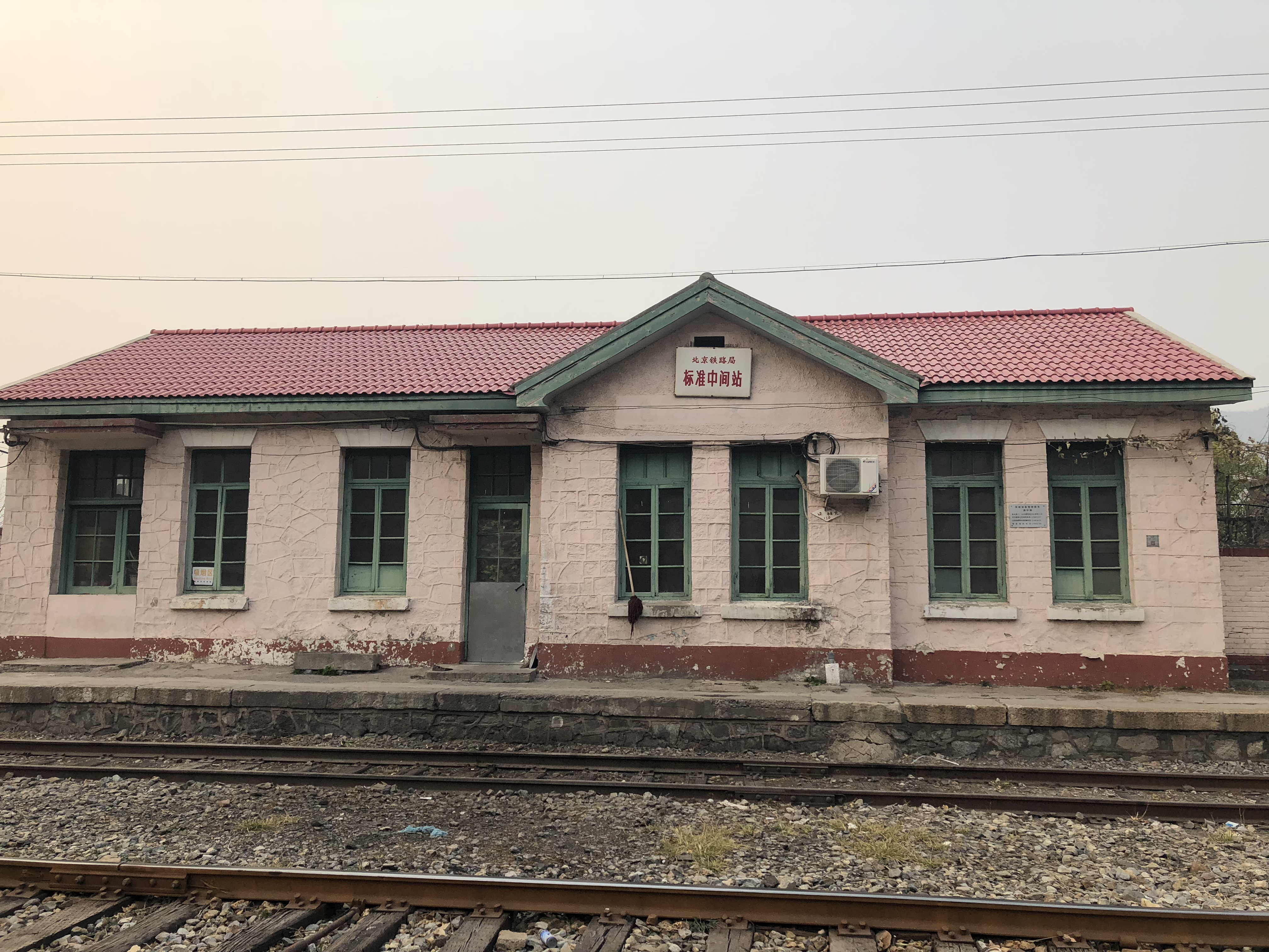 色樹墳站-站房